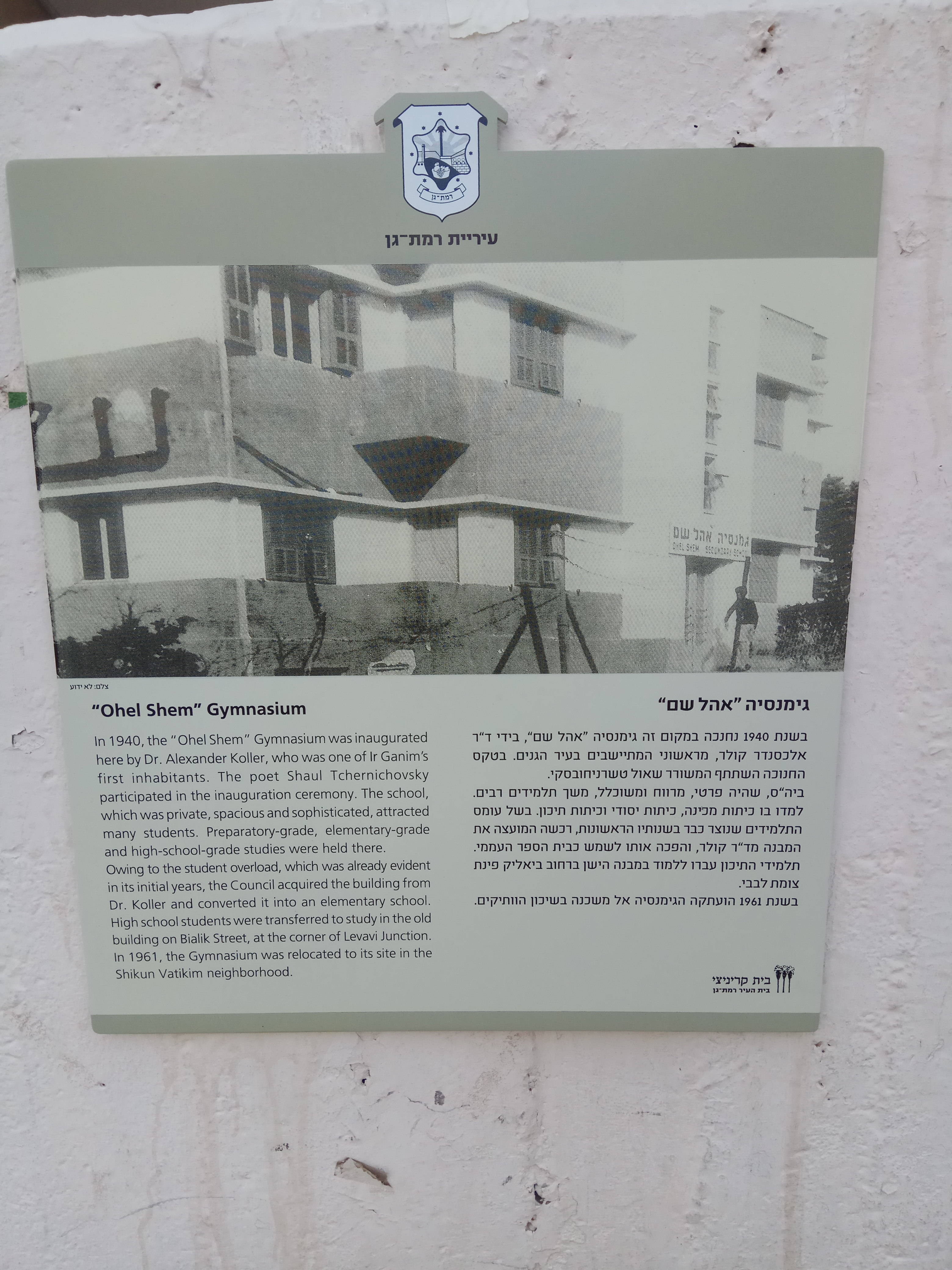 שלט הסבר ברחוב קריניצי על בית הספר אוהל שם